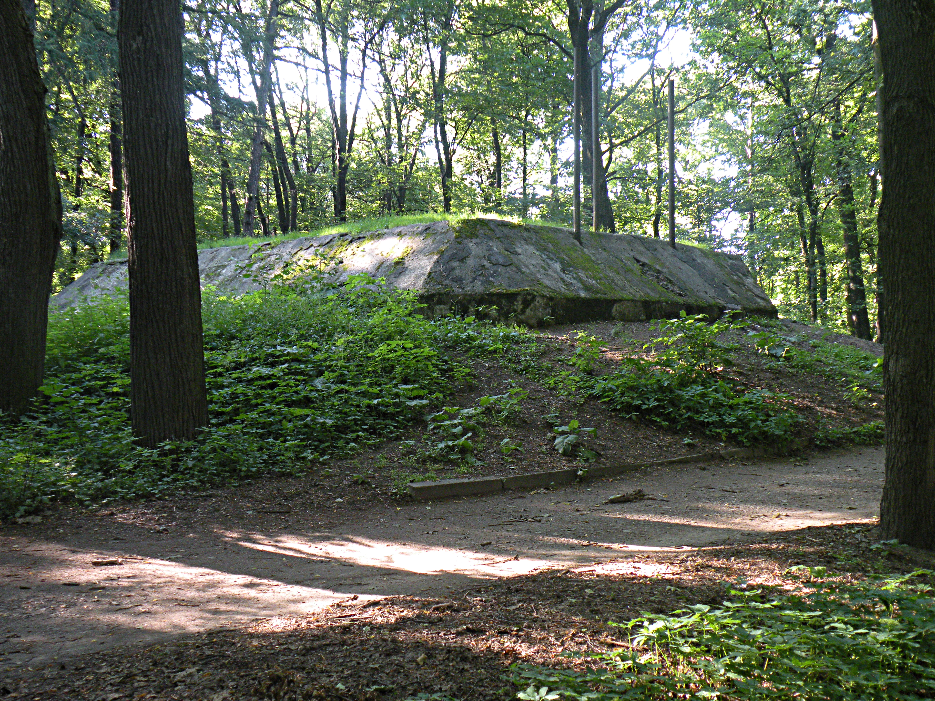 Forest_Academy_bunker.SPb